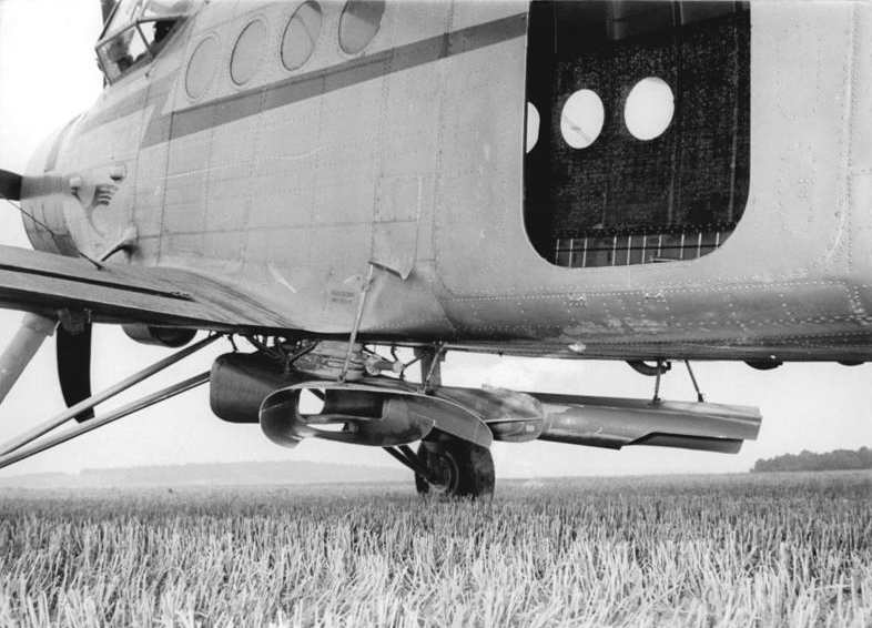 Agrarflieger zur Schädlingsbekämpfung Zentralbild Wittig Weiß-Ho. 15.8.1957 Lufthansa bekämpft Kiefernspanner. In den Gebieten von Arnstadt, Stadtilm und Ilmenau sind etwa 2300 ha Wald vom Kiefernspanner befallen. Ein Spezialflugzeug der Deutschen Lufthansa vom Typ AN 2 bekämpft nach Abschluss entsprechender Verträge mit den staatlichen Forstwirtschaftsbetrieben und den Abteilungen Landwirtschaft und Pflanzenschutz bei den Räten der Bezirke die Schädlinge mit DDT und HCC-Mitteln. Bei einer Arbeitsflughöhe von 5-10 m über dem Wald und einer Arbeitsbreite von 30 m sowie einer Fluggeschwindigkeit von 150 km-h werden 40 kg Stäubemittel pro ha von der Maschine ausgestreut. UBz: Blick auf die unter dem Flugzeugrumpf angebrachte winkelförmige Verteilerschaufel.